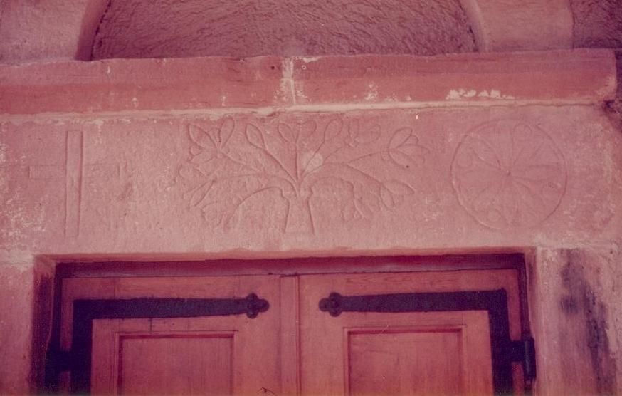 Türsturz der Wittelbacher Kirche von 1132